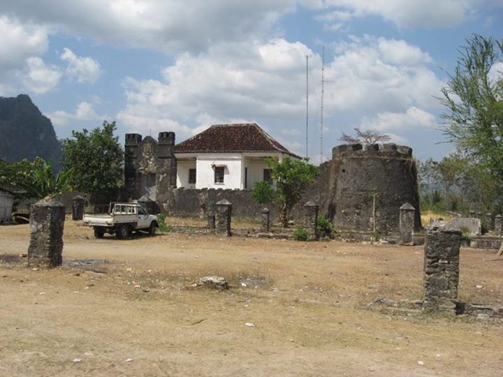 Tetun: Benteng